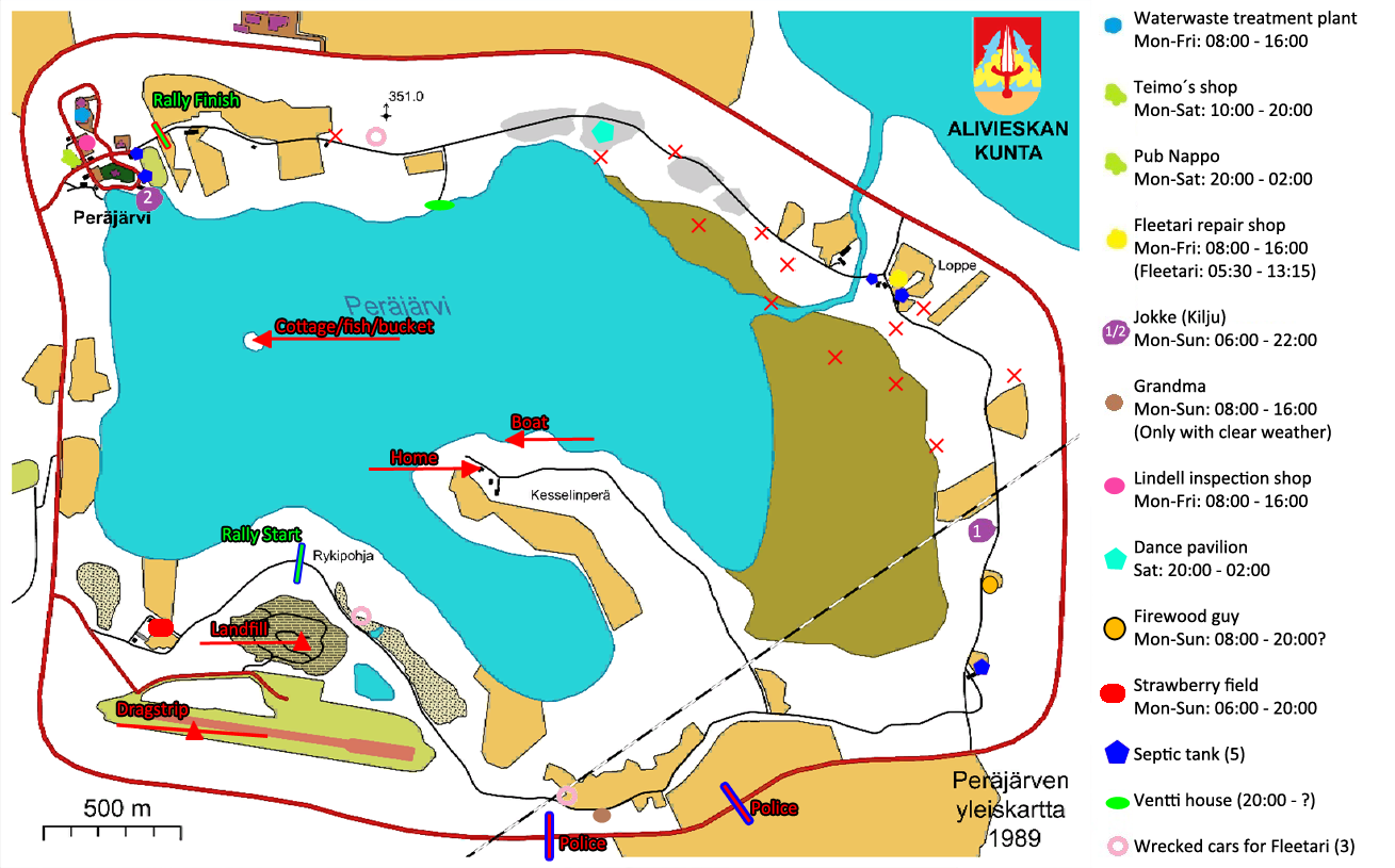 Peräjärvi my summer car map satsuma